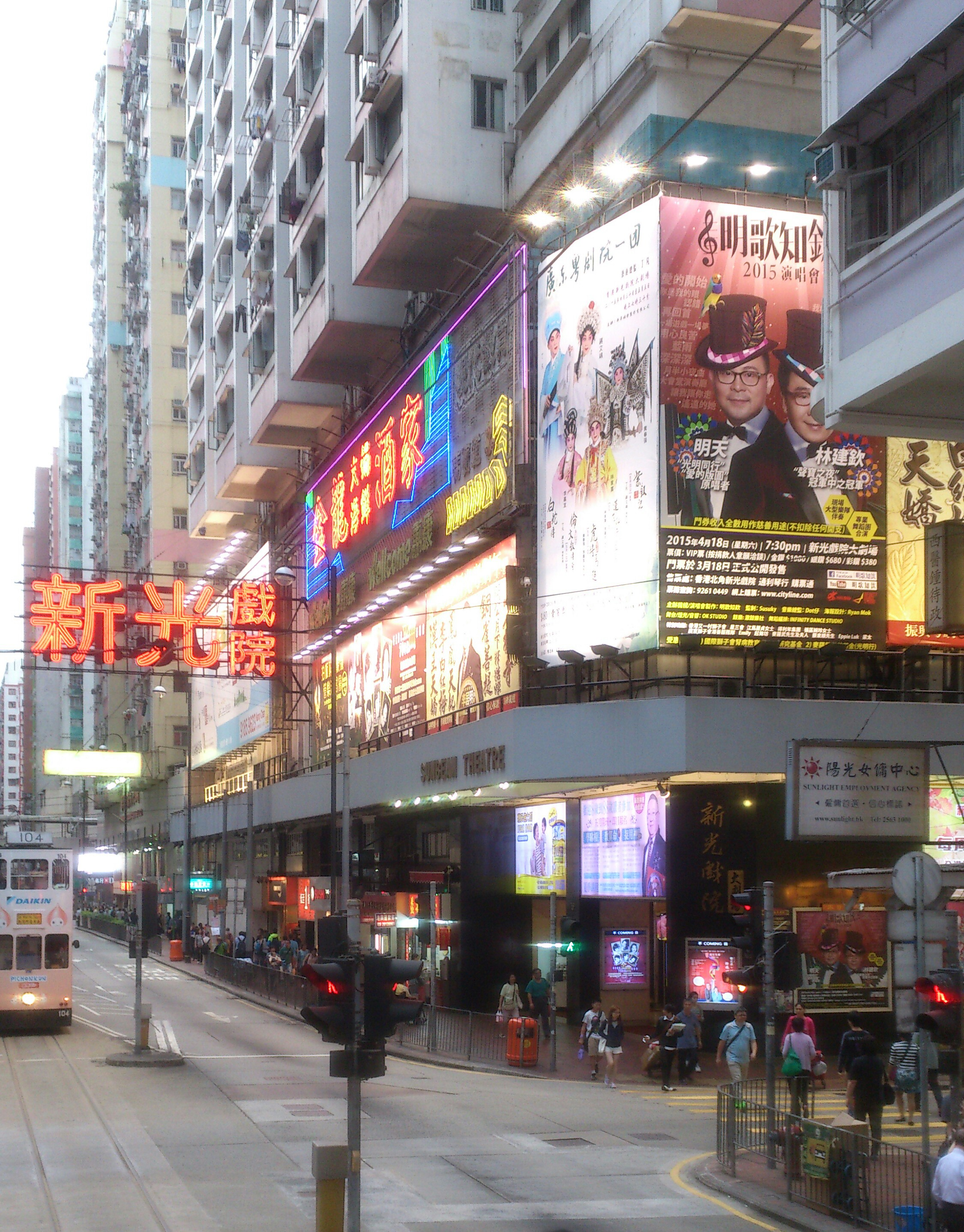 香港北角新光戲院